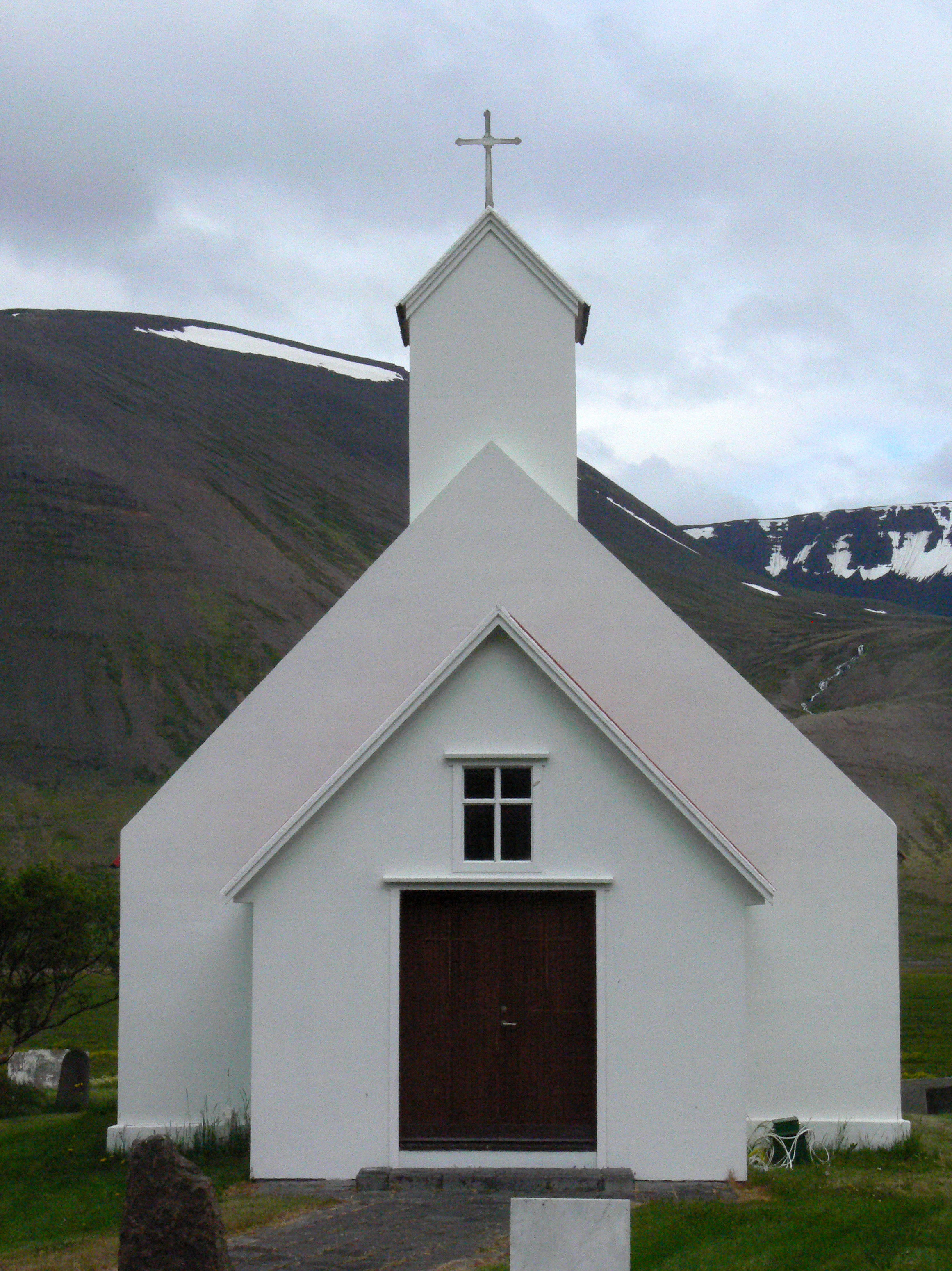 Kirche Holt im Önundarfjörður.